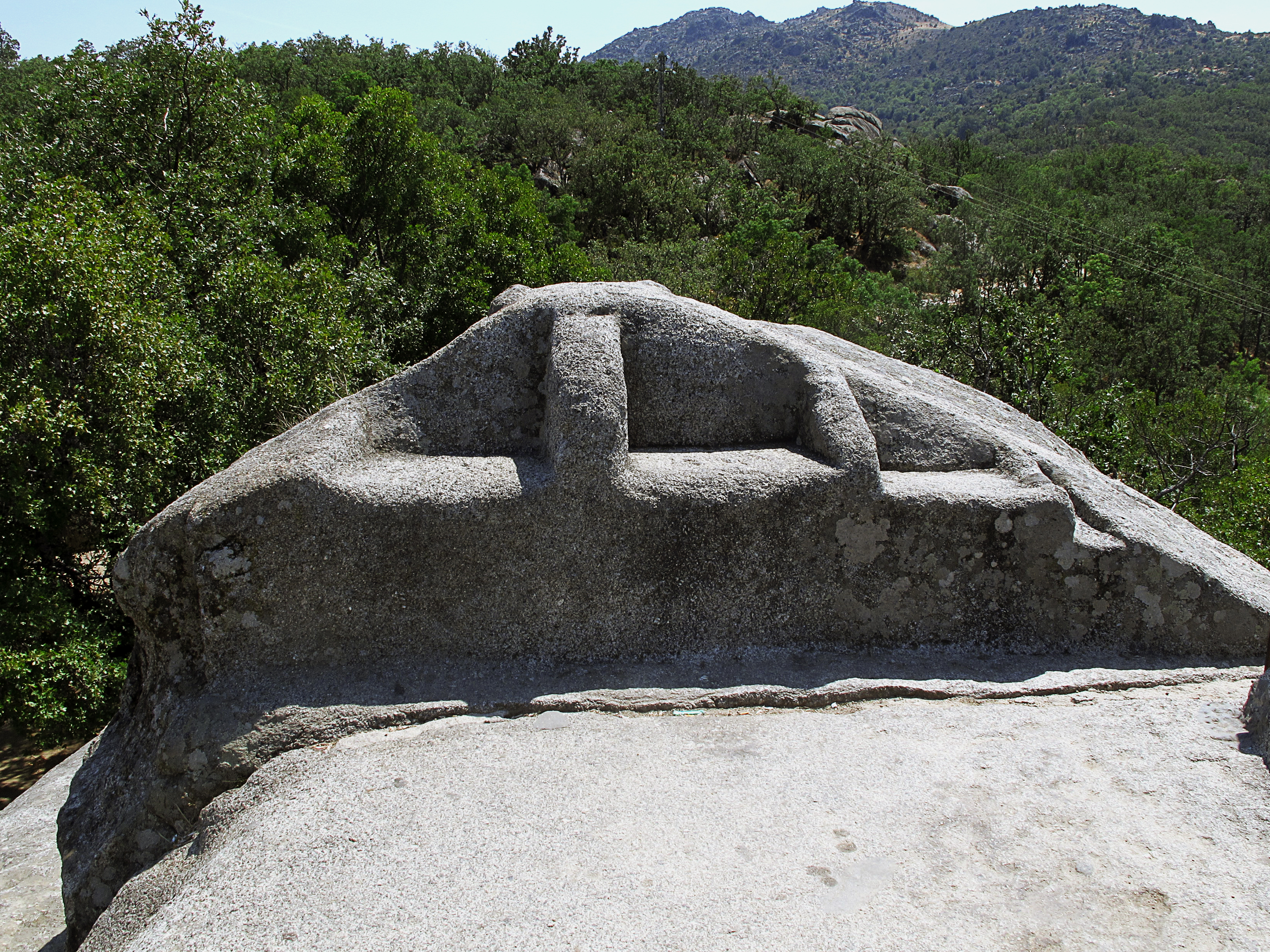 Magia, herejía y superstición La relación del monarca Felipe II, uno de los reyes más controvertidos de la historia, con el esoterismo y la alquimia. ¿Es el monasterio de El Escorial una representación del cosmos?